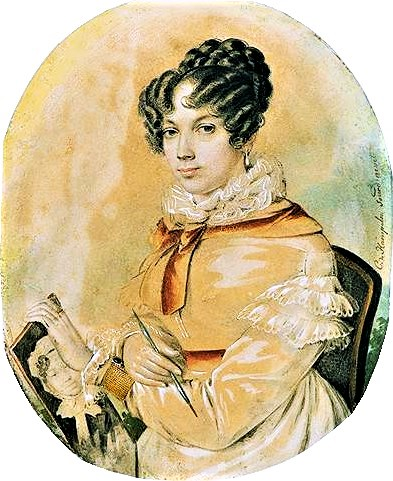 Гампельн К. Е. П. Коновницына, рисующая портрет матери. 1823-1824 год. Графиня Елизавета Петровна Коновницына (1802-1867), дочь военного министра Петра Петровича Коновницына. Муж - Нарышкин Михаил Михайлович, активный участник движения декабристов, был осужден по четвертому разряду. Вместе с мужем жила при каторжных тюрьмах в Чите и Петровском Заводе, затем на поселении в Кургане. После определения Нарышкина в солдаты последовала за ним на Кавказ.